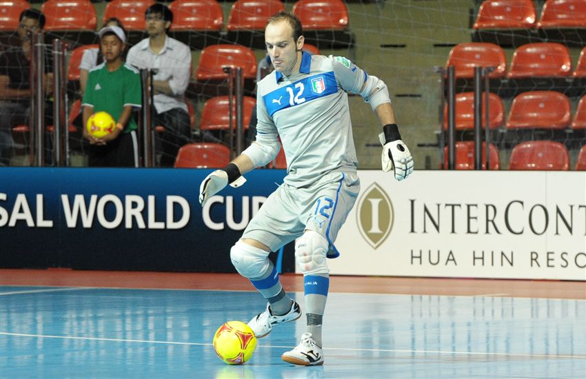 Valerio Barigelli, giocatore di calcio a 5 italiano